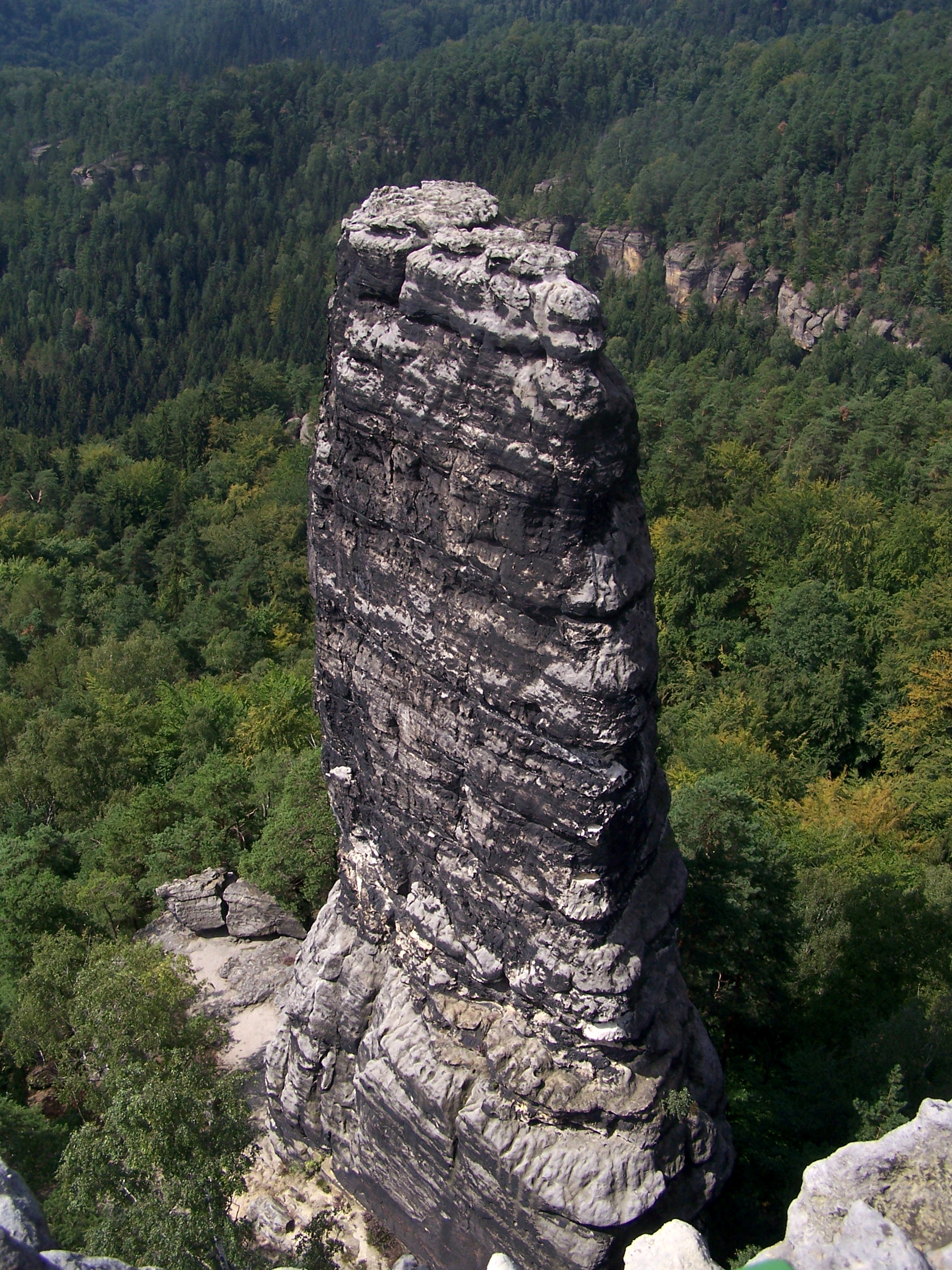 Kleiner Prebischkegel von nahe dem Prebischtor